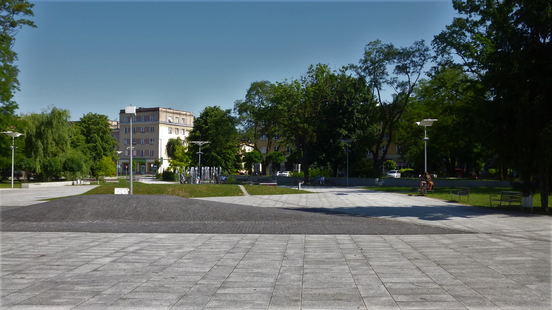 Plac mjra Jana Gryczmana, Nowa Dęba 27-05-2018